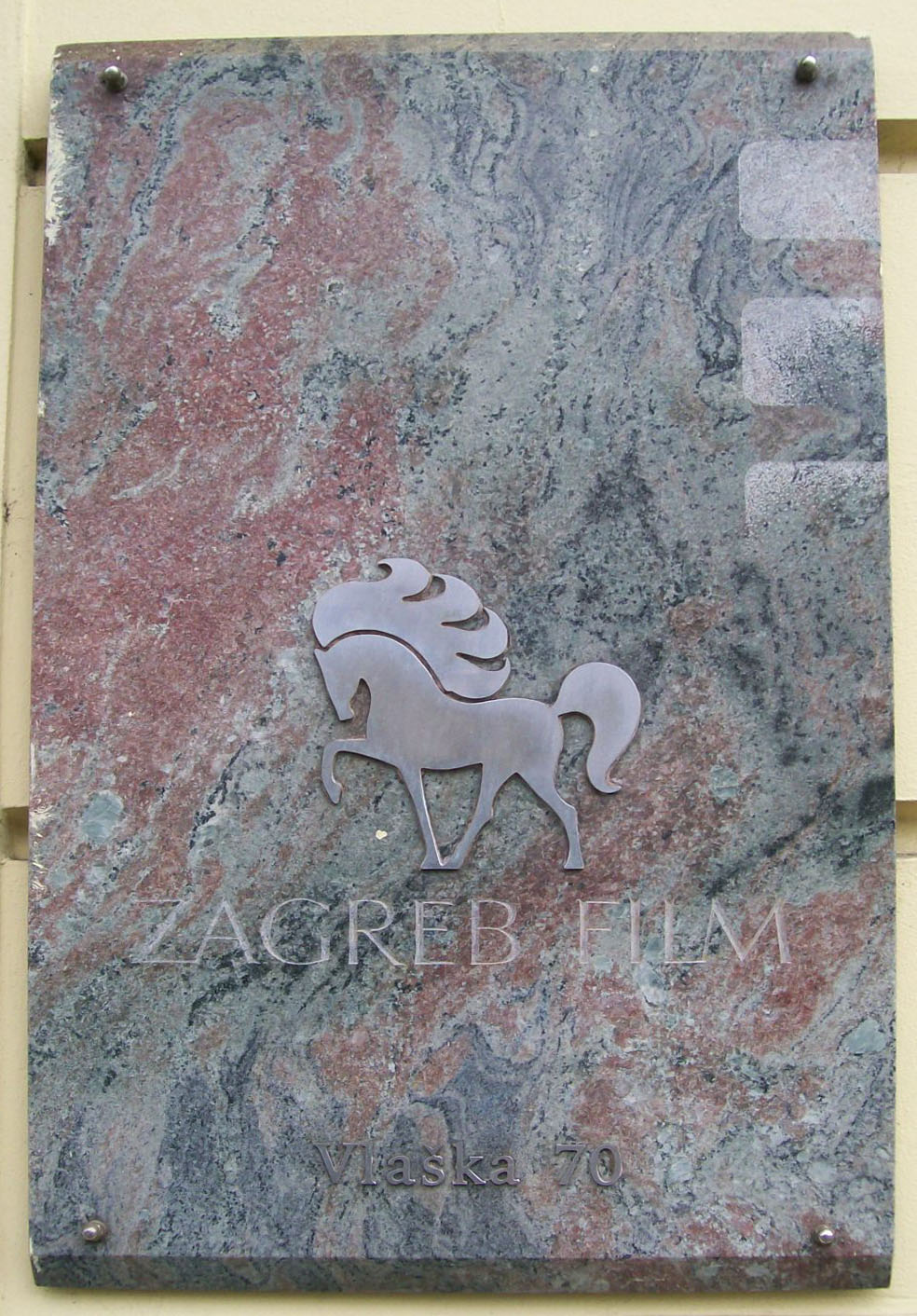 Ploča Zagreb film, Vlaška 70